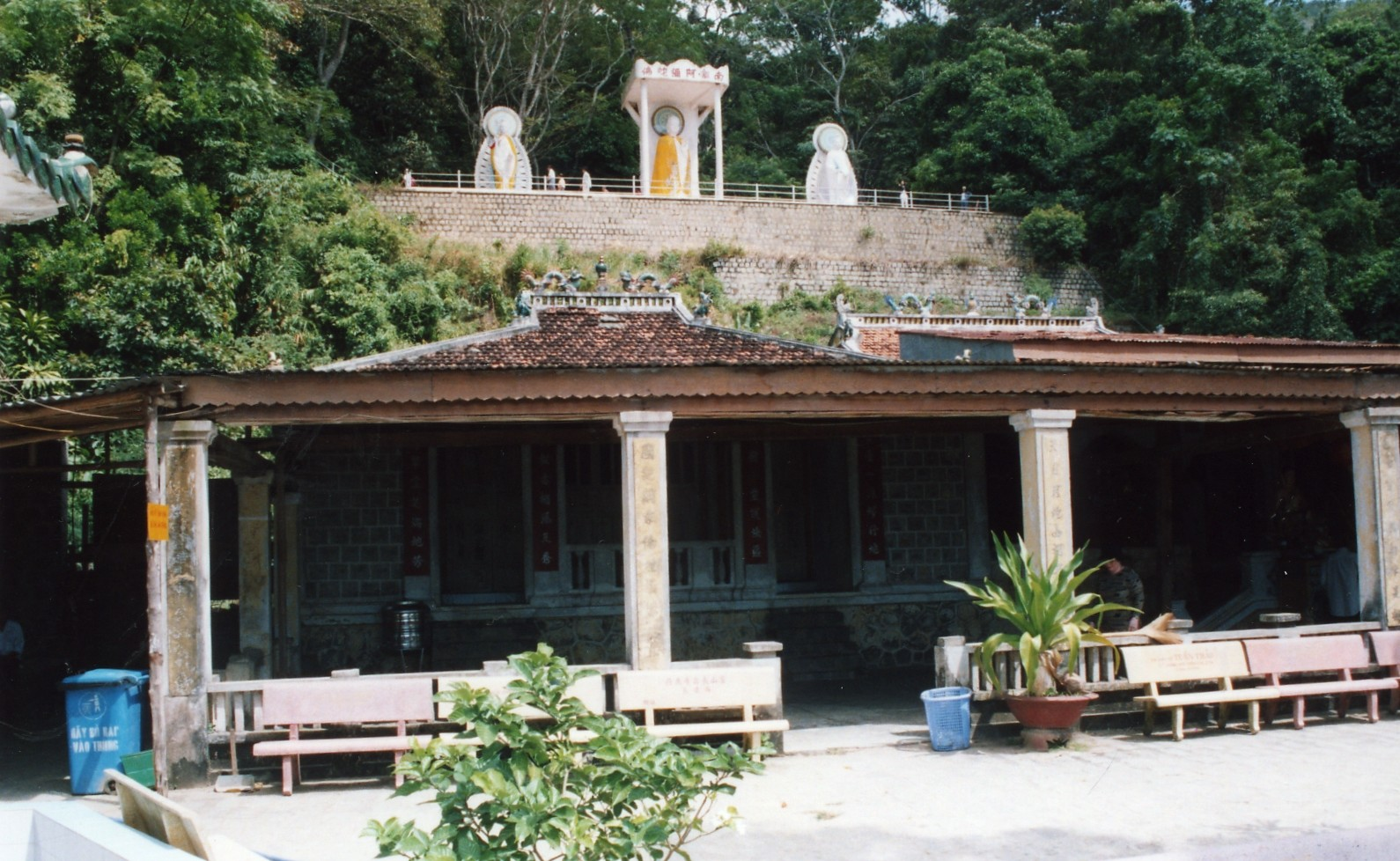 Chùa núi Tà Cú, Bình Thuận. Hình này do Phan Ba tự chụp vào tháng 11 năm 2005 và đưa vào phạm vi công cộng.